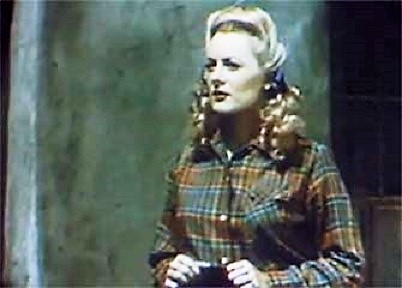 Virginia Maples